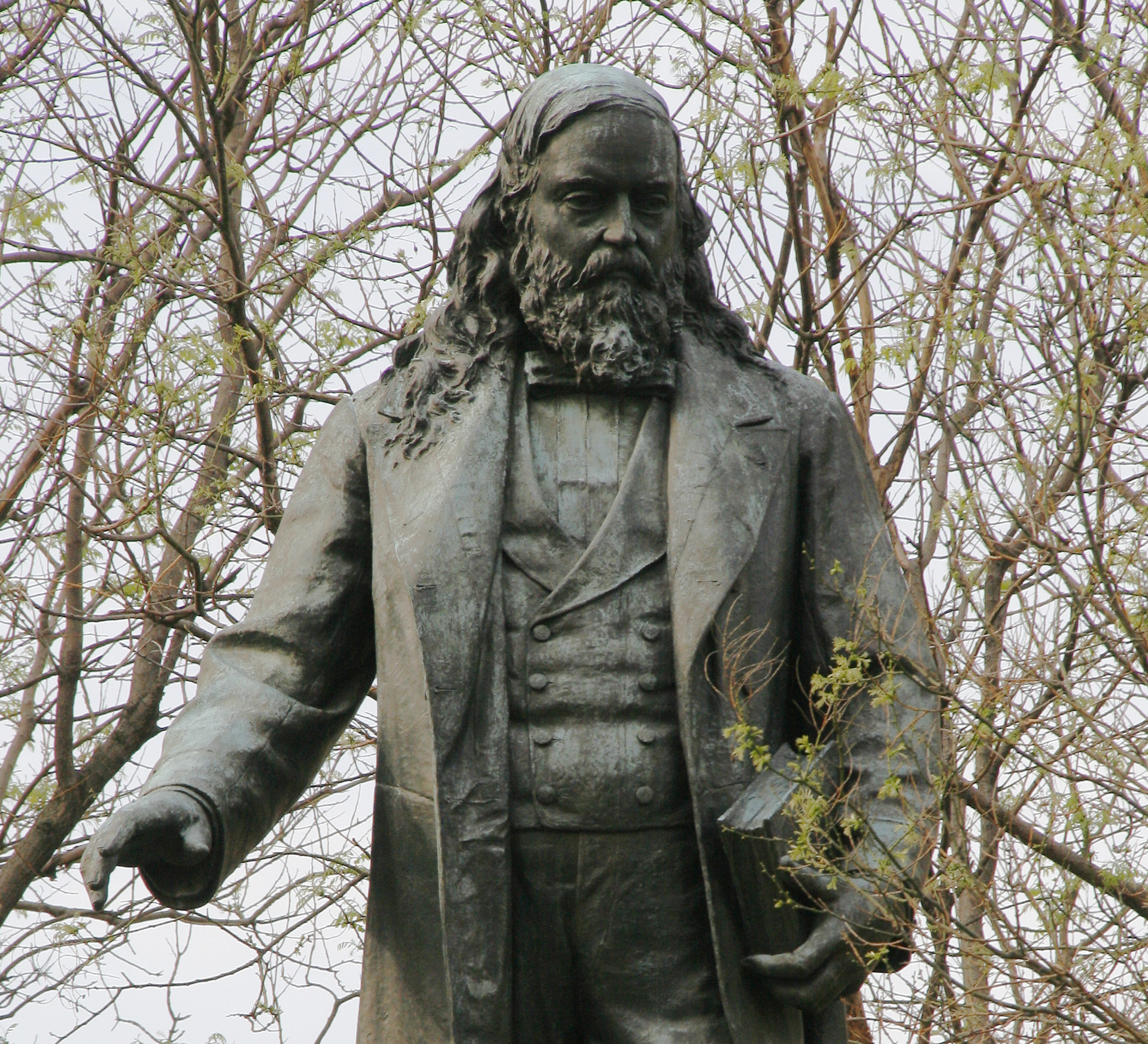 Brigadier General Albert Pike statue in Washington, D.C.